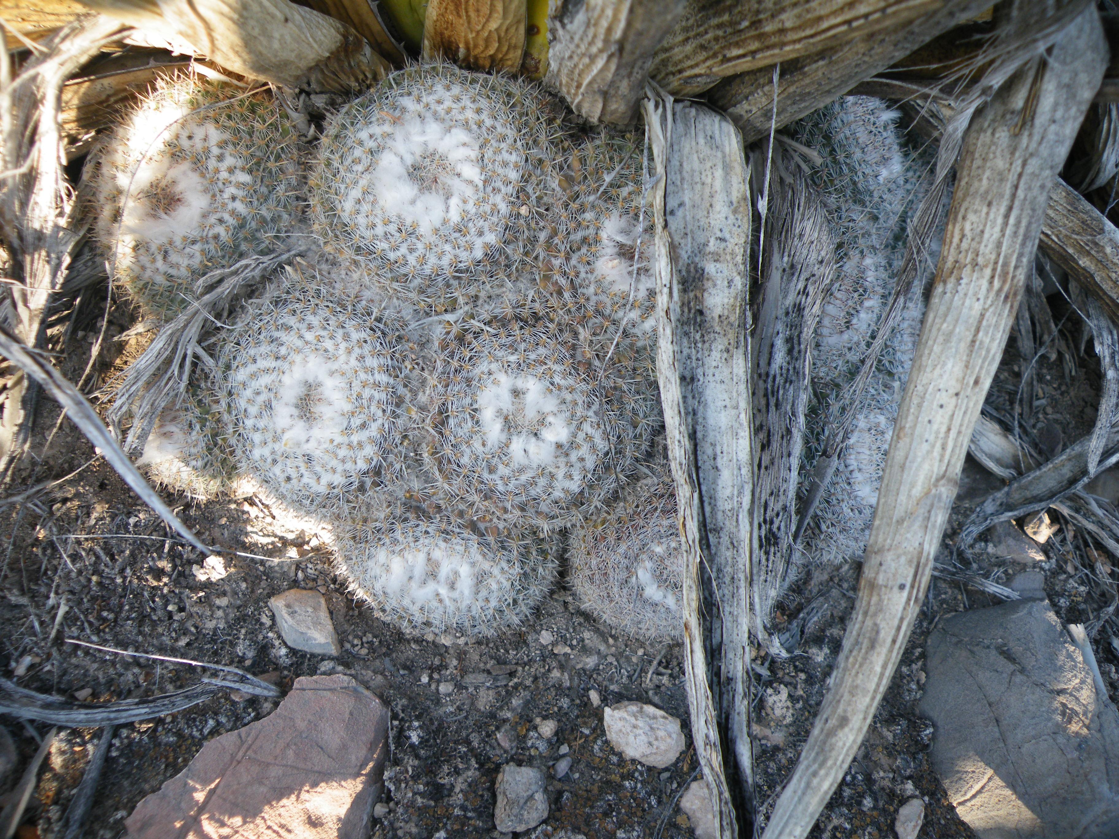 Mammillaria formosa - Concepcion del Oro, Zacatecas